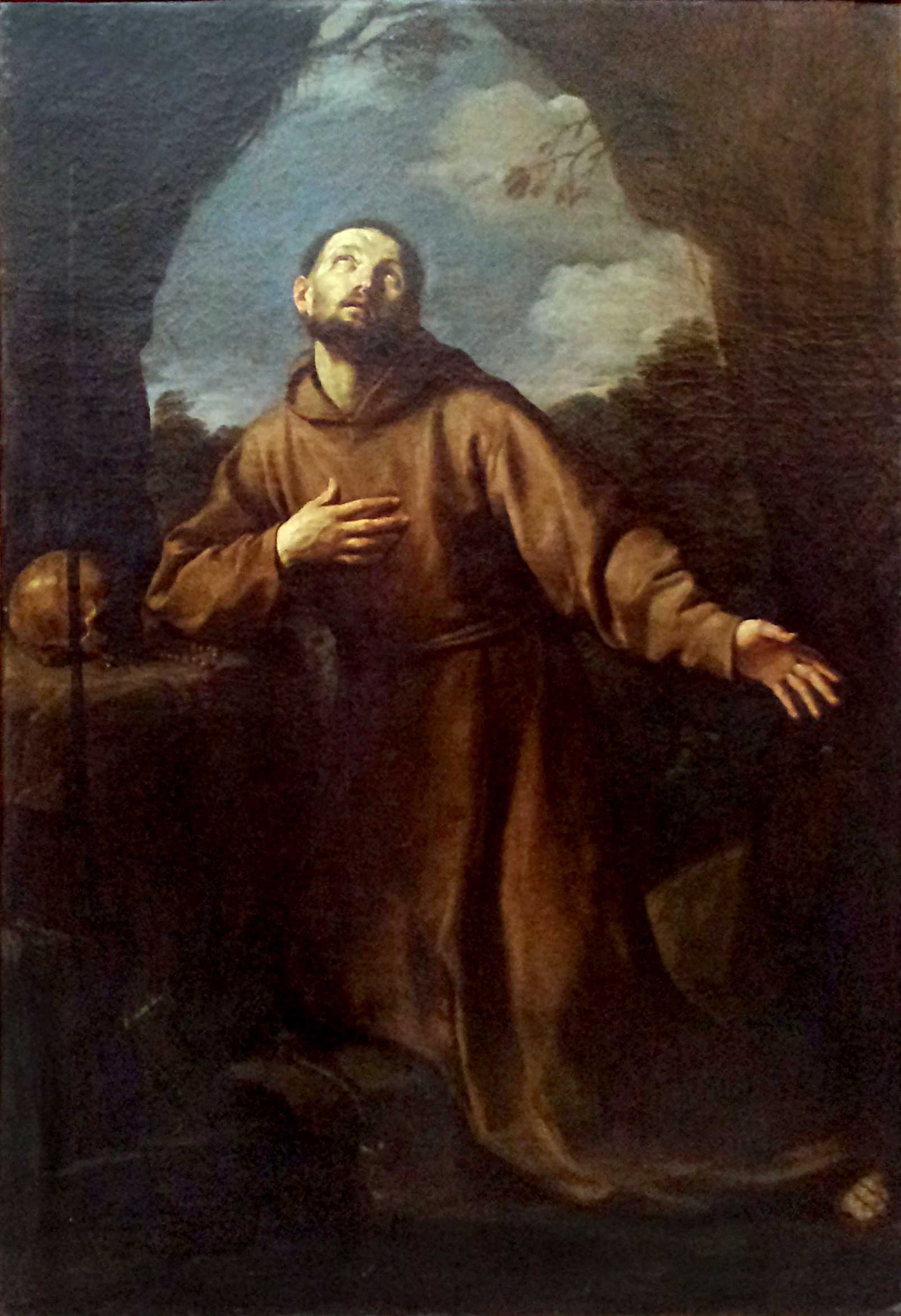 Chiesa dei Girolamini (Napoli) - Passeggetto con alcune tele che conduce alla Sacrestia. La tela inquadrata è un'opera di Guido Reni: San Francesco in estasi (1622) olio su tela (198x133 cm)